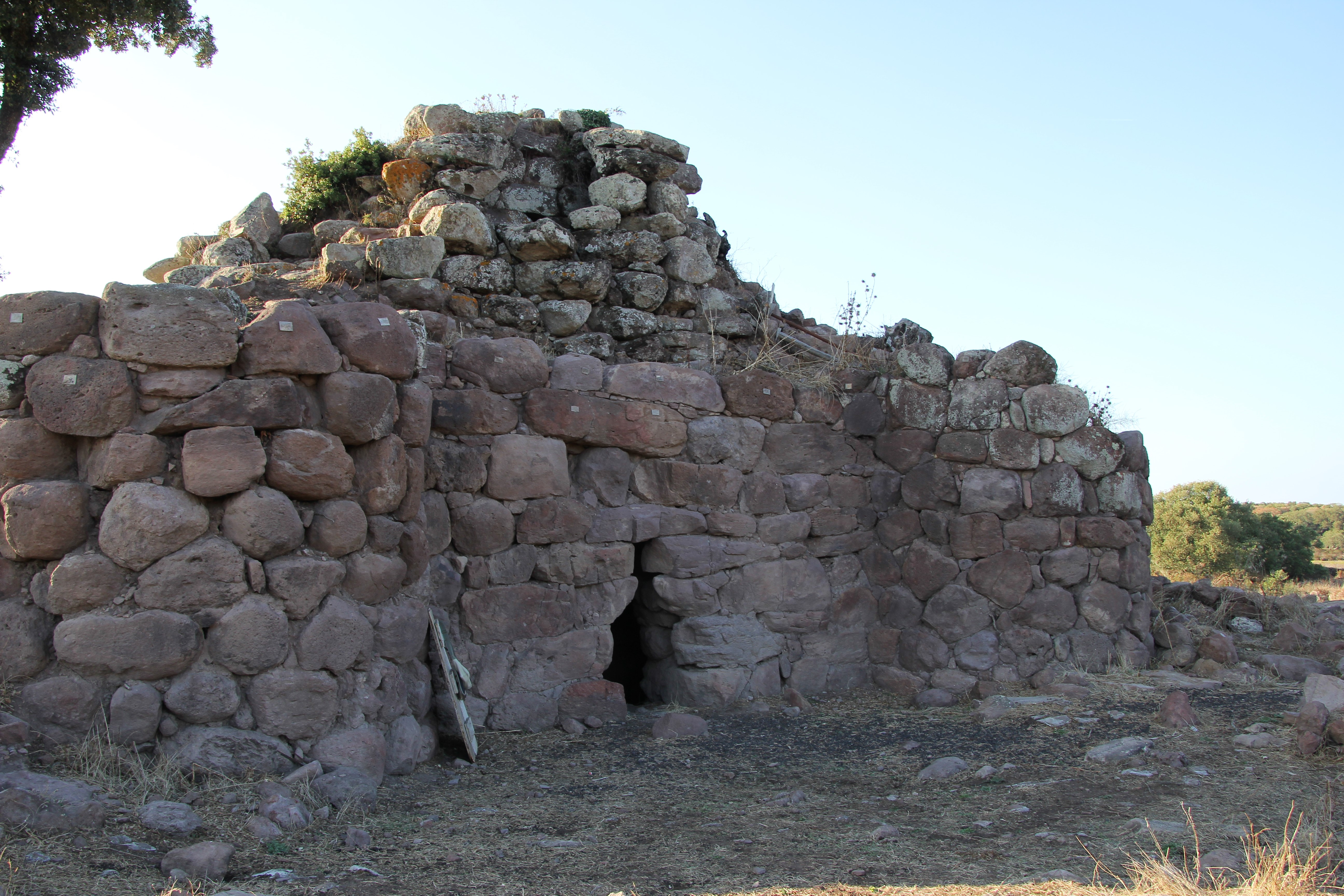 Area archeologica del nuraghe Appiu This is a photo of a monument which is part of cultural heritage of Italy.